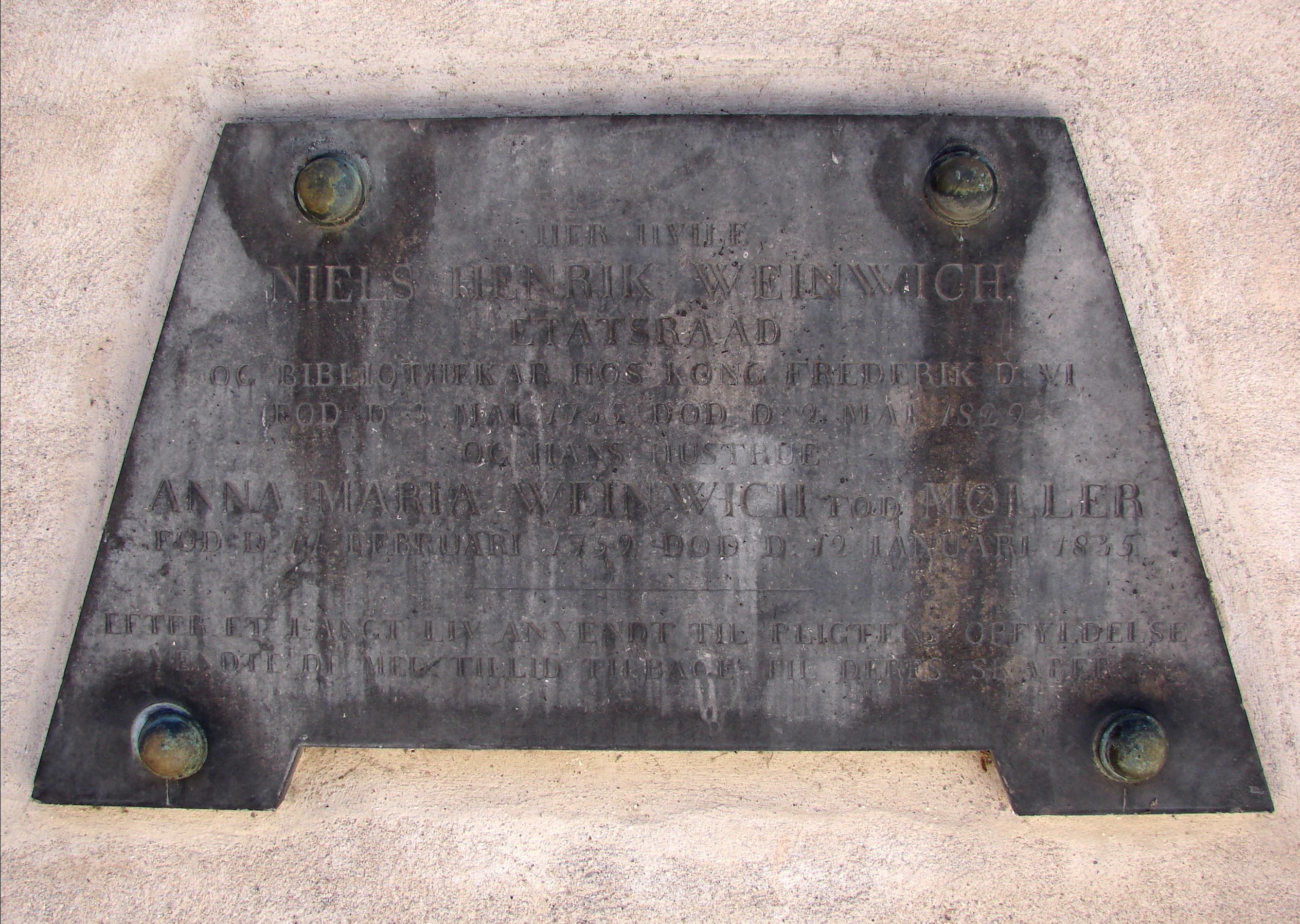 Niels Henrik (Heinrich) Weinwich, dansk-norsk forfatter, oversætter, litterat, etatsråd og bibliotekar hos kong Christian VII og Kronprinsen, født på Holmegaard, Mandals Amt i Norge 3. maj 1755, død 2. maj 1829 i København, gravminde med hustru Anna Maria født Møller, ved Sankt Petri Kirke, København